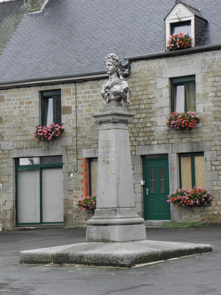 Monument républicain de la commune de Rimou (Ille-et-Vilaine).